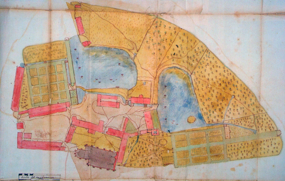 Lageplan Kloster Lamspringe 1695 angefertigt